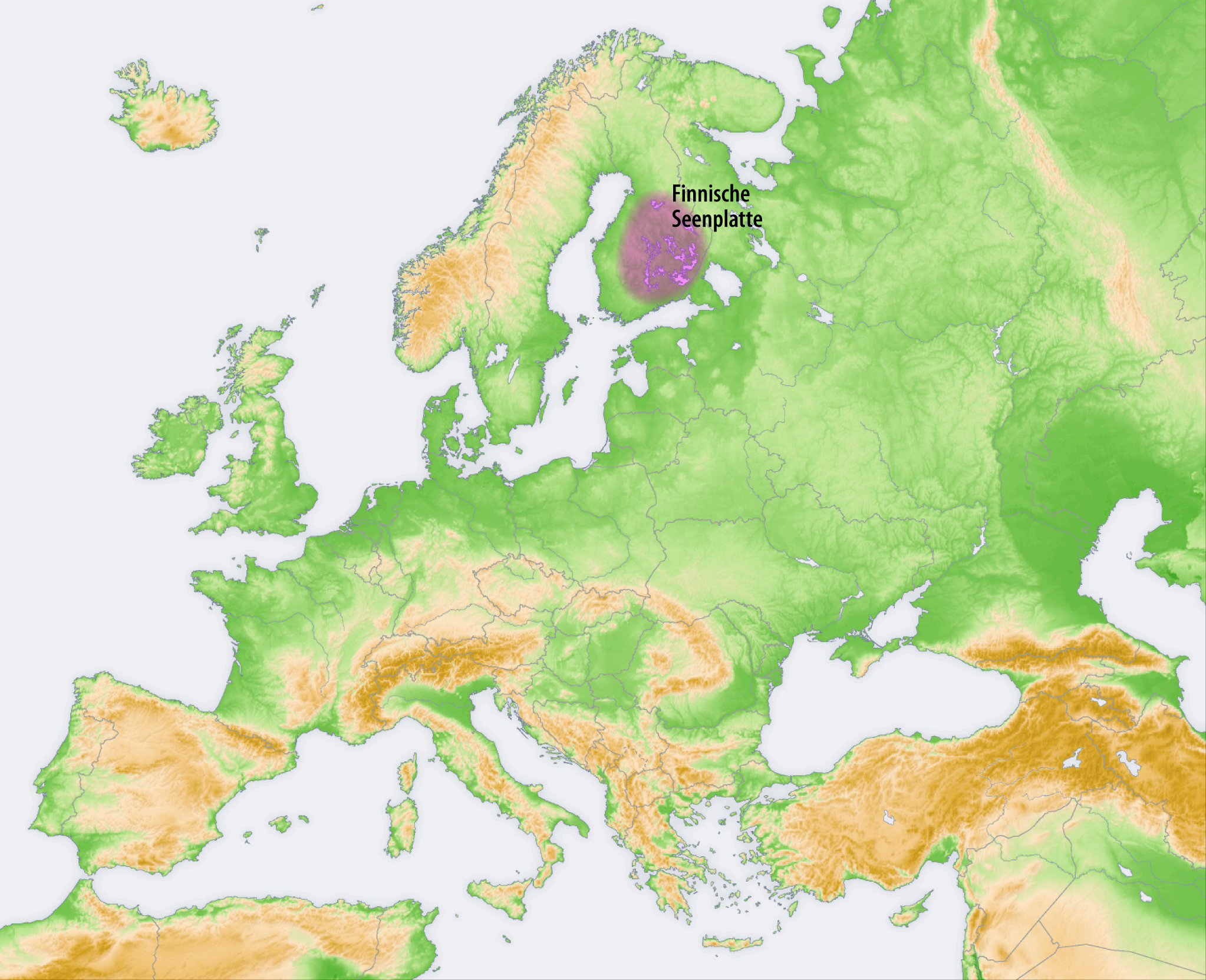 Landschaften der Osteuropäischen Ebene: Finnische Seenplatte